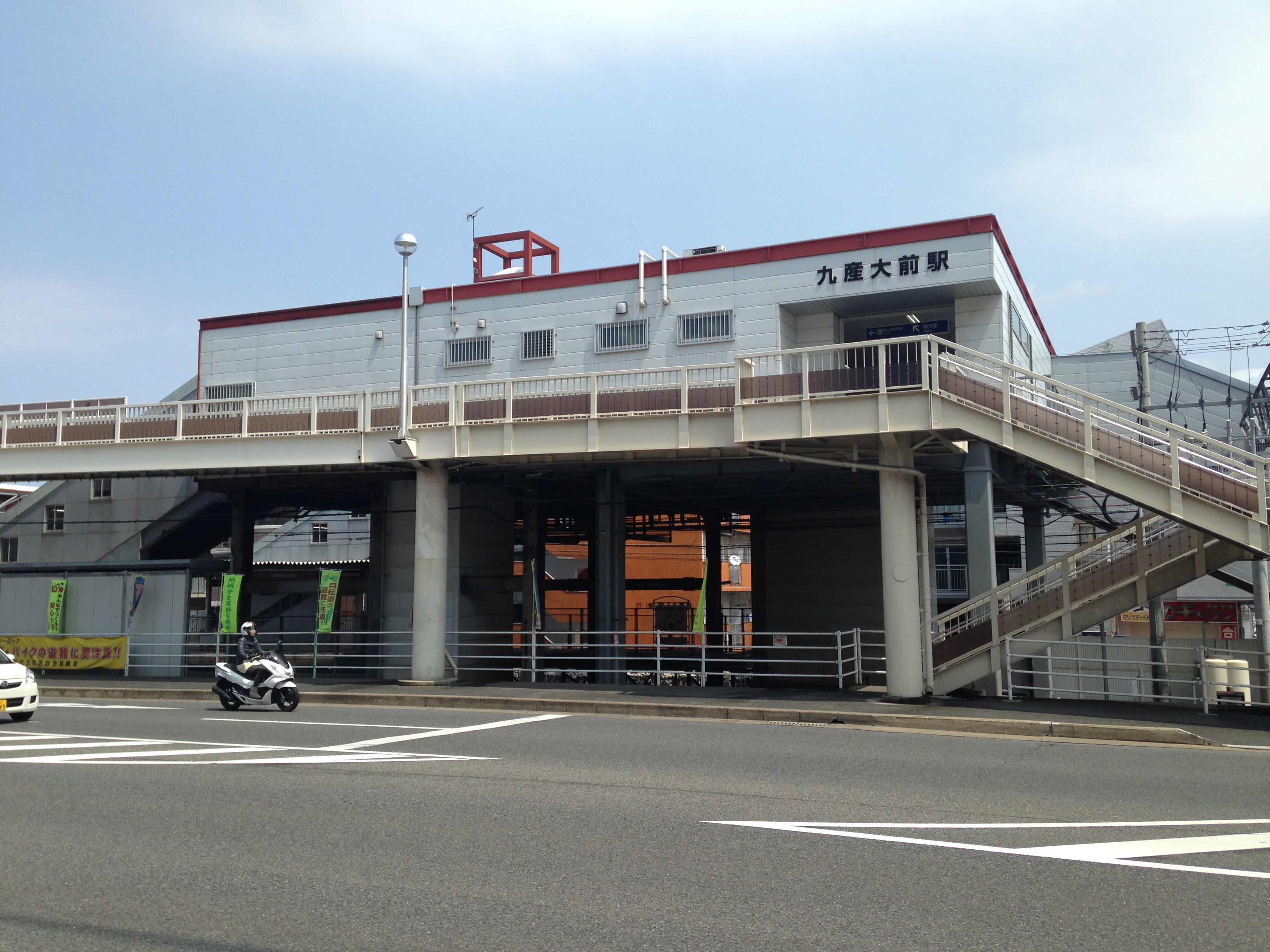 国道495号の向こう側より望む九産大前駅